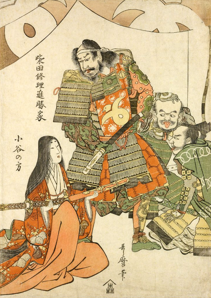 柴田修理進勝家と小谷の方、1803-1804